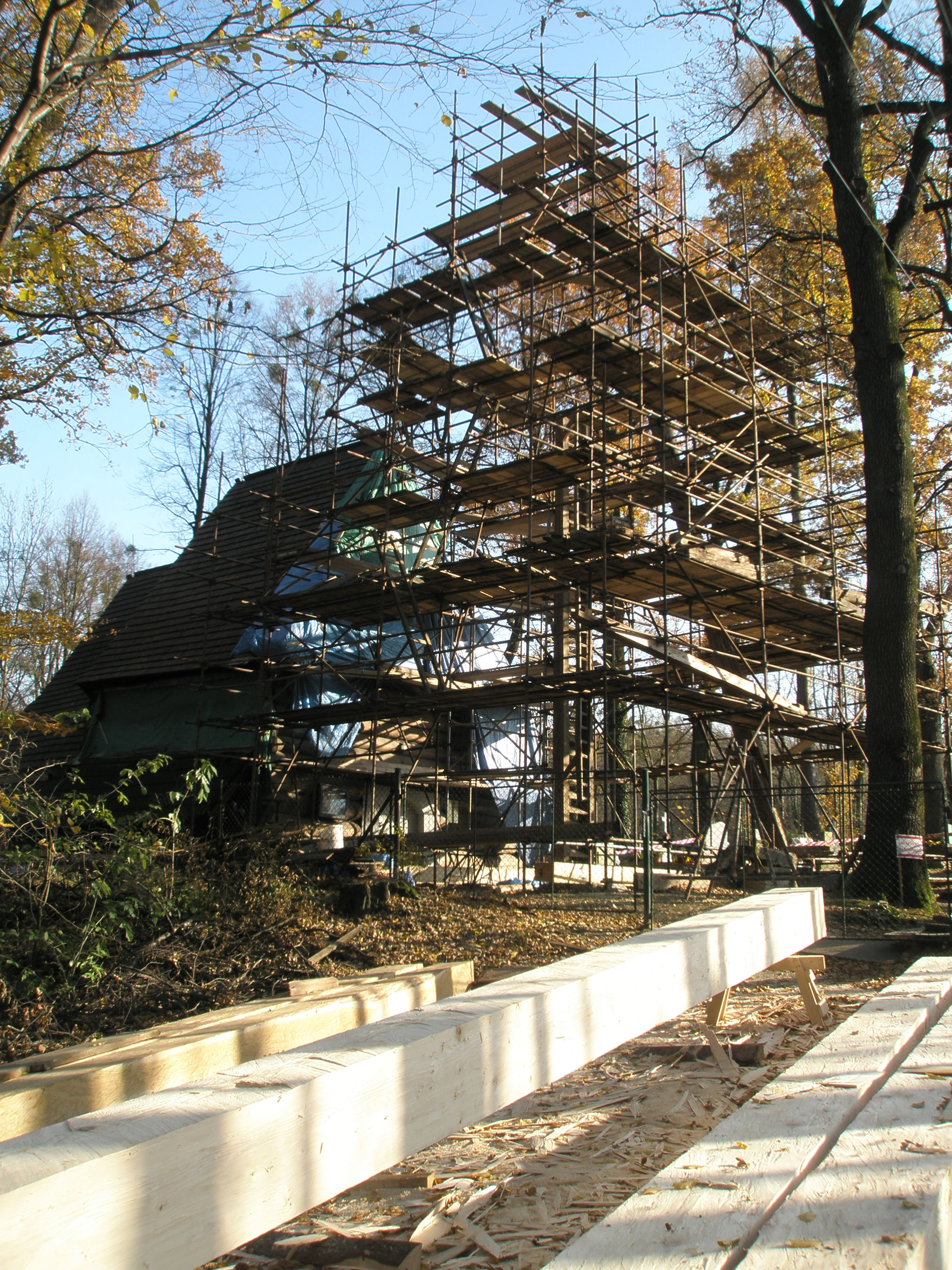 Rekonstrukce Kostela Božího těla v Gutech (2011)